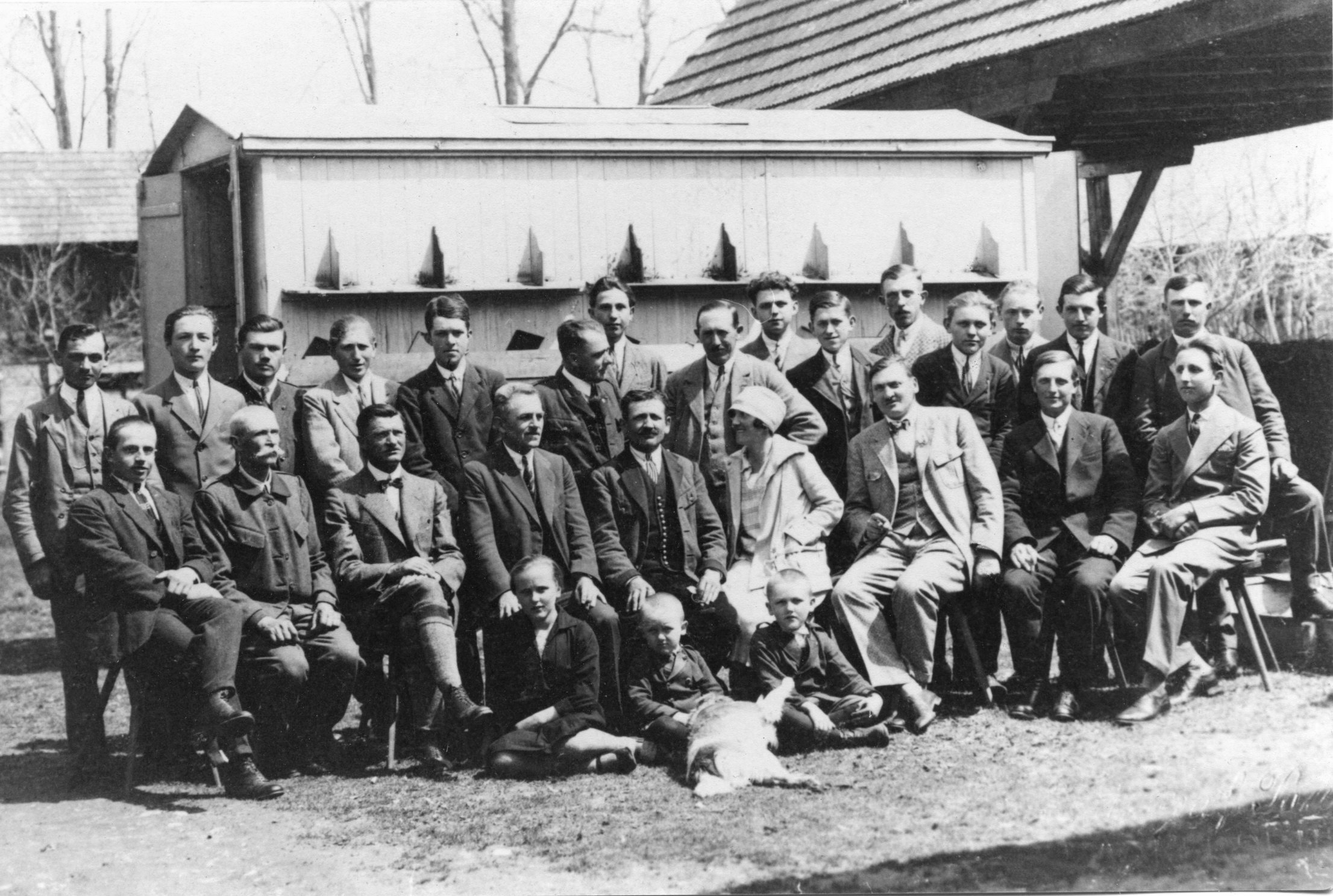 Gruppenbild von einer der vielen Imkerversammlungen, die der österreichisch-ungarische Imker Leopold Gombocz (1875–1943) in seiner Großimkerei in Laafeld bei Radkersburg (Steiermark) regelmäßig veranstaltete, hier im Jahr 1930. Leopold Gombocz sitzt in der Mitte der ersten Reihe, rechts neben ihm seine Lebensgefährtin; davor die Tochter Elisabeth und seine Söhne, Johann und Ferdinand (von links nach rechts,die Kinder stammen aus seiner früheren Ehe, seine Frau verstarb 1929),. Hinter der Gruppe ist einer der von Gombocz entwickelten und angefertigten, speziellen Bienenwagen zu sehen. Bei den schlanken Bäumen im Hintergrund handelt es sich um Robinien (Scheinakazie), die Gombocz zwecks Gewinnung von Akazienhonig bevorzugt auf eigenem Grund anpflanzte. aber auch Bauernkollegen dazu anregte diese anzupflanzen, er belohnte sie mit Honig oder stellte die Robinienpflanzen zur Verfügung.